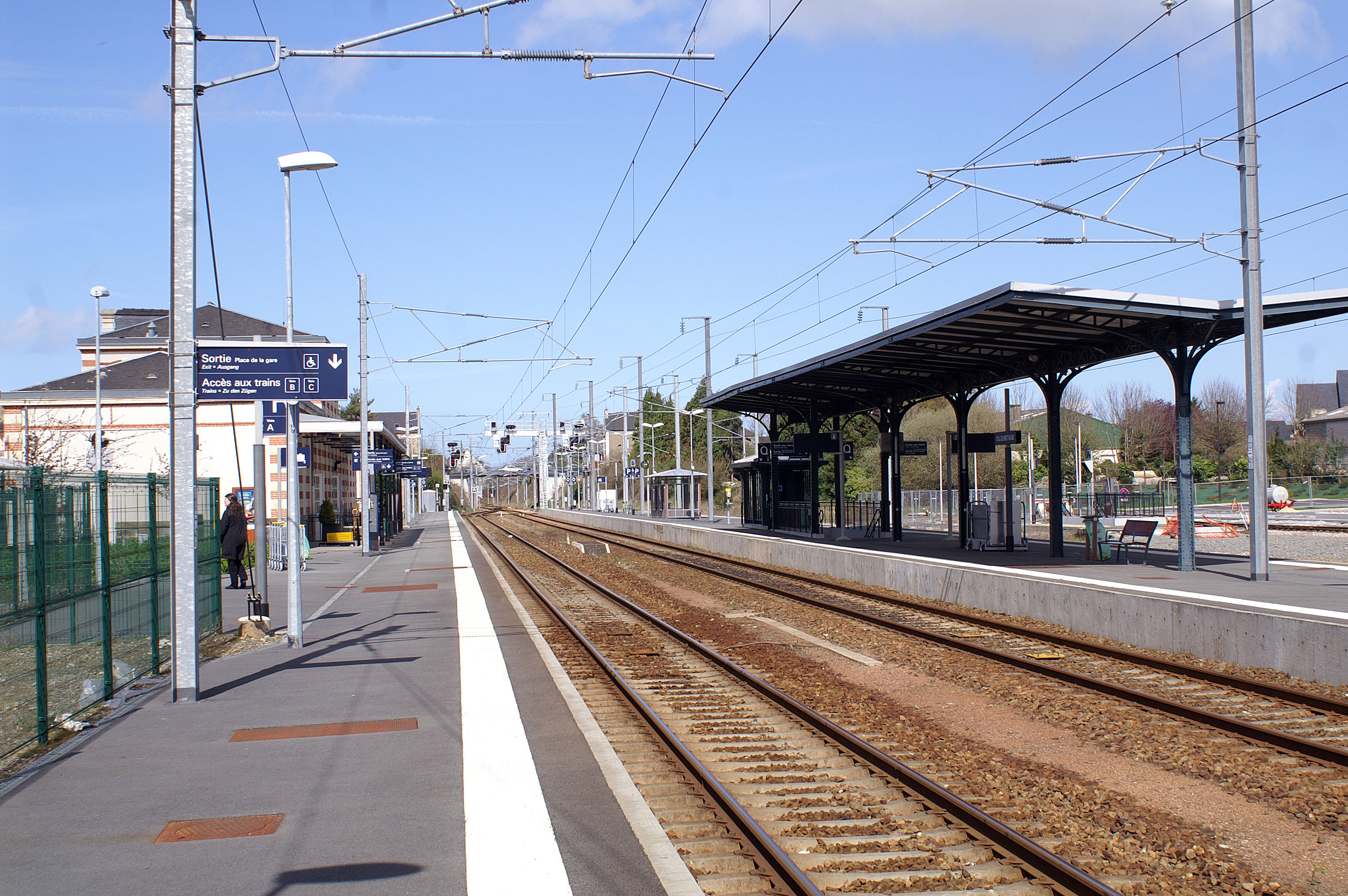 Intérieur de la gare de Dol de Bretagne, voies en direction de Saint-Malo.